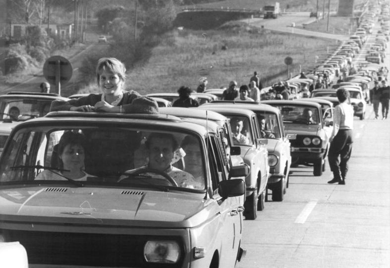 ADN-ZB-Ludwig-10.11.89-Bez. Erfurt: Reiseregelung-Der Verkehr auf der Autobahn Magdeburg-Marienborn wird von Stunde zu Stunde dichter. Trotz zügiger Abfertigung von DDR-Bürgern am Grenzübergang Wartha im Kreis Eisenach kam es zu erheblichem Stau.